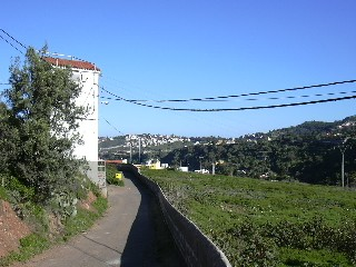 El Monte Lentiscal en un día despejado. Imagen tomada por Simón Hernández Dalmau el 11 de enero de 2005 a las 15:30 en Las Meleguinas, Santa Brígida (Gran Canaria). Categoría:España (imagen) Categoría:Fotografía (imagen)